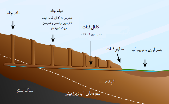 قنات